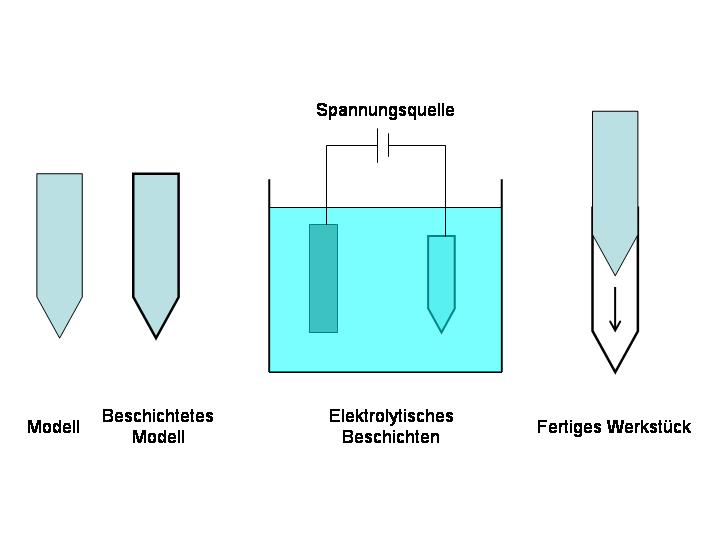 Prinzip des Galvanoformens Erstellt von Niko Dubbert, 27.07.2006